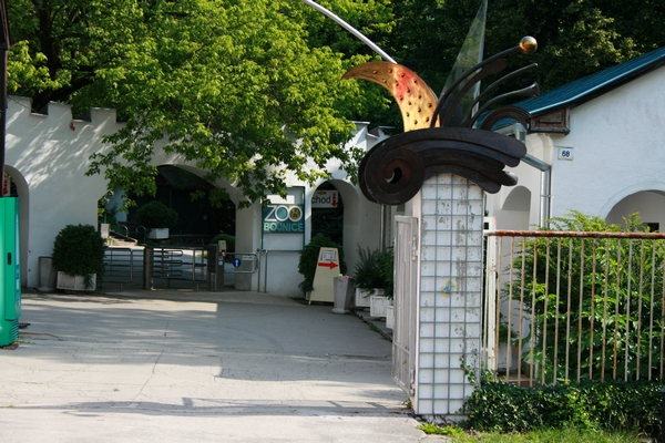 ZOO Bojnice - Hlavný vchod